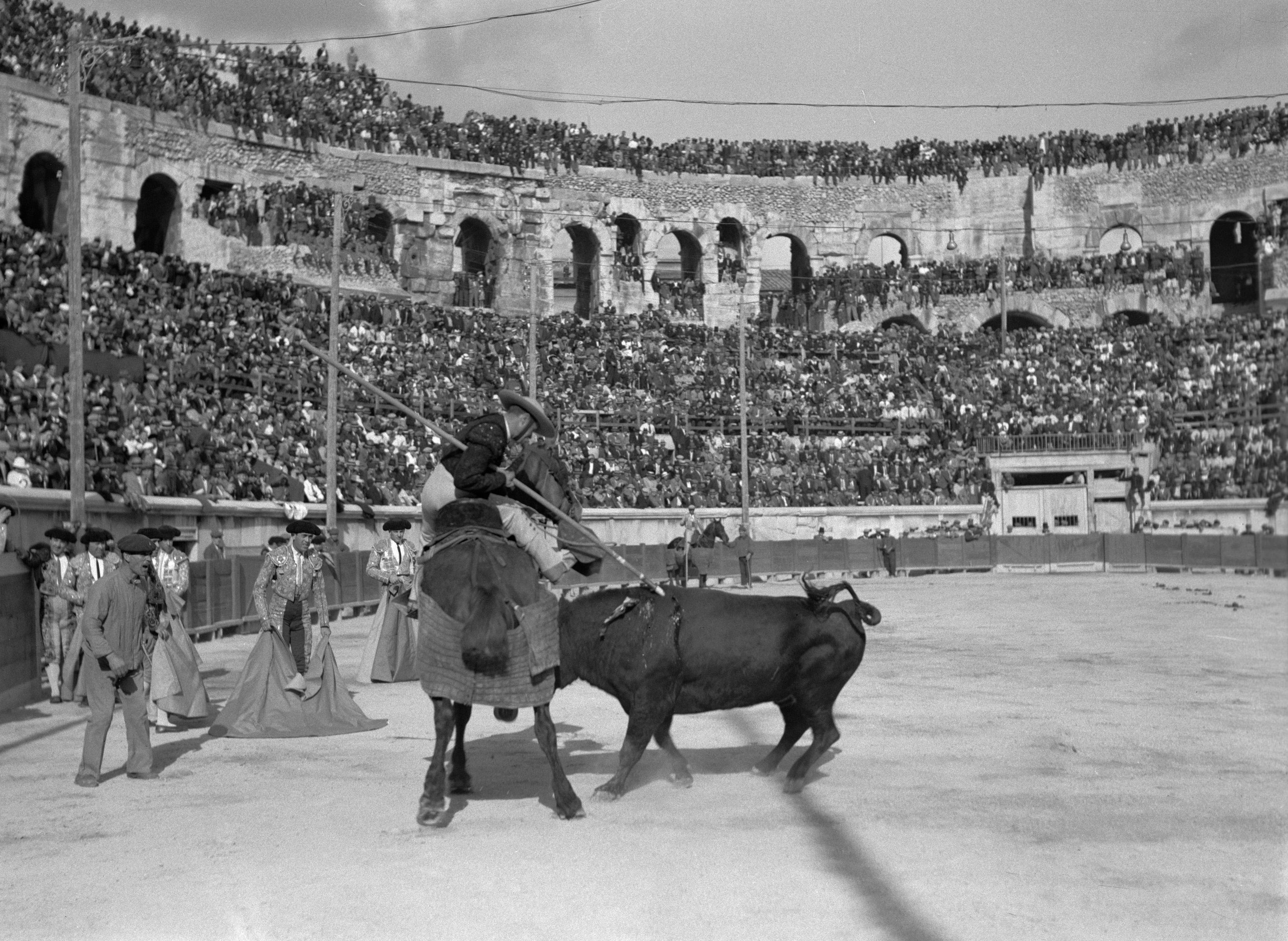 Collectie / Archief : Fotocollectie Van de Poll Reportage / Serie : Stierengevecht in de Arena van Nîmes Beschrijving : Picador steekt stier met lans, links de torero's Annotatie : De picador (Spaans voor "prikker") is de persoon die bij het stierenvechten de spiezen (banderillas) in de stier steekt. De picadores komen doorgaans pas later in het stierengevecht de arena binnen en rijden meestal op door middel van dikke kussens beschermde paarden. Aanvankelijk is de stier door de torero met behulp van de muleta (een half-cirkelvormige doek van zware rode flanel) afgemat en nadat de picadores hun taak volbracht hebben, komt de matador om de stier te doden [Bron Wikipedia april 2013] Datum : 1 september 1935 Locatie : Frankrijk, Nîmes Trefwoorden : arena's, paarden, publiek, stieren, stierengevechten, tribunes Fotograaf : Poll, Willem van de Auteursrechthebbende : Nationaal Archief Materiaalsoort : Glasnegatief Nummer archiefinventaris : bekijk toegang 2.24.14.02 Bestanddeelnummer : 191-0409